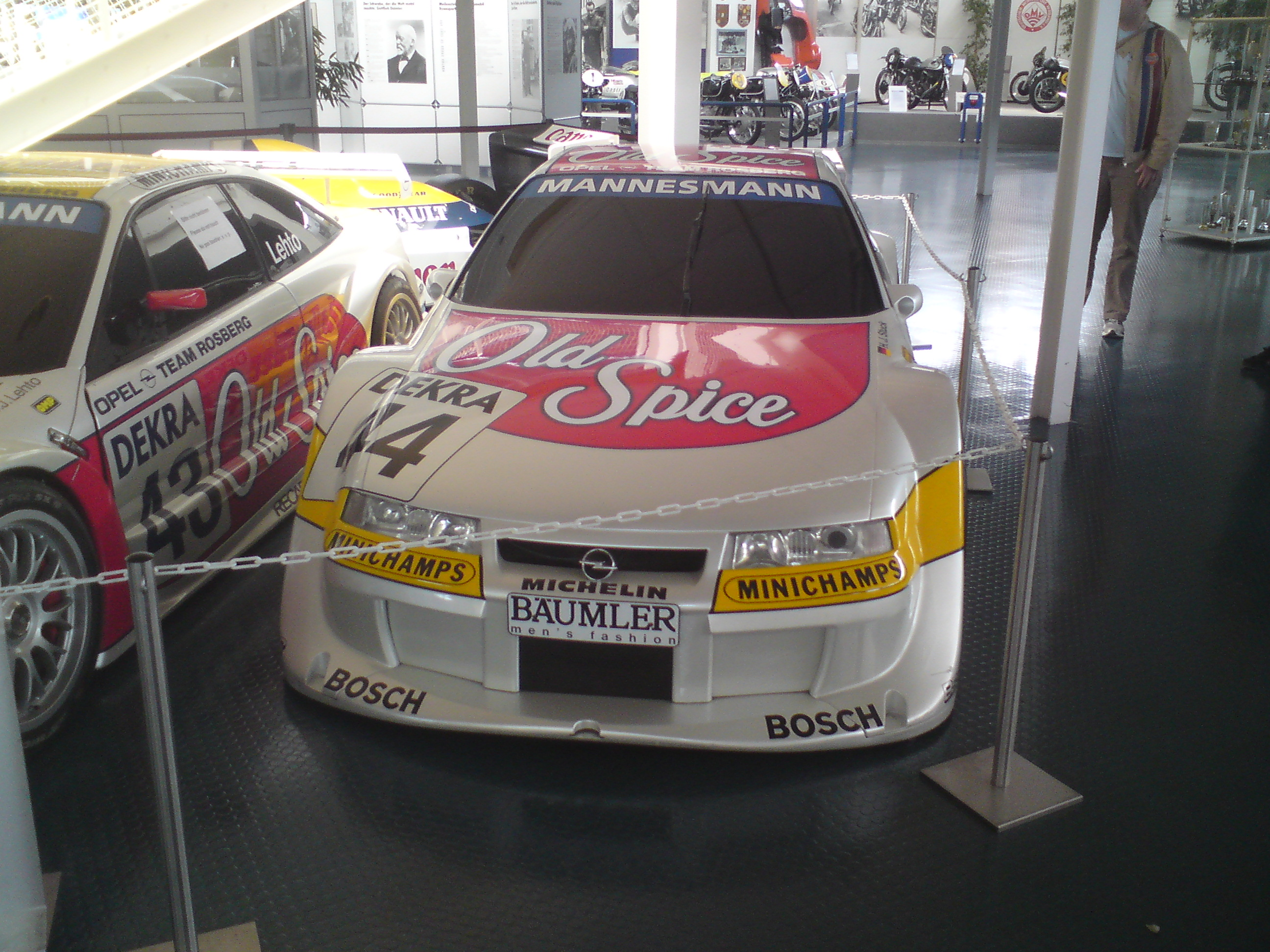 Calibra Silhouette im Motorsport Museum Hockenheim Team Rosberg